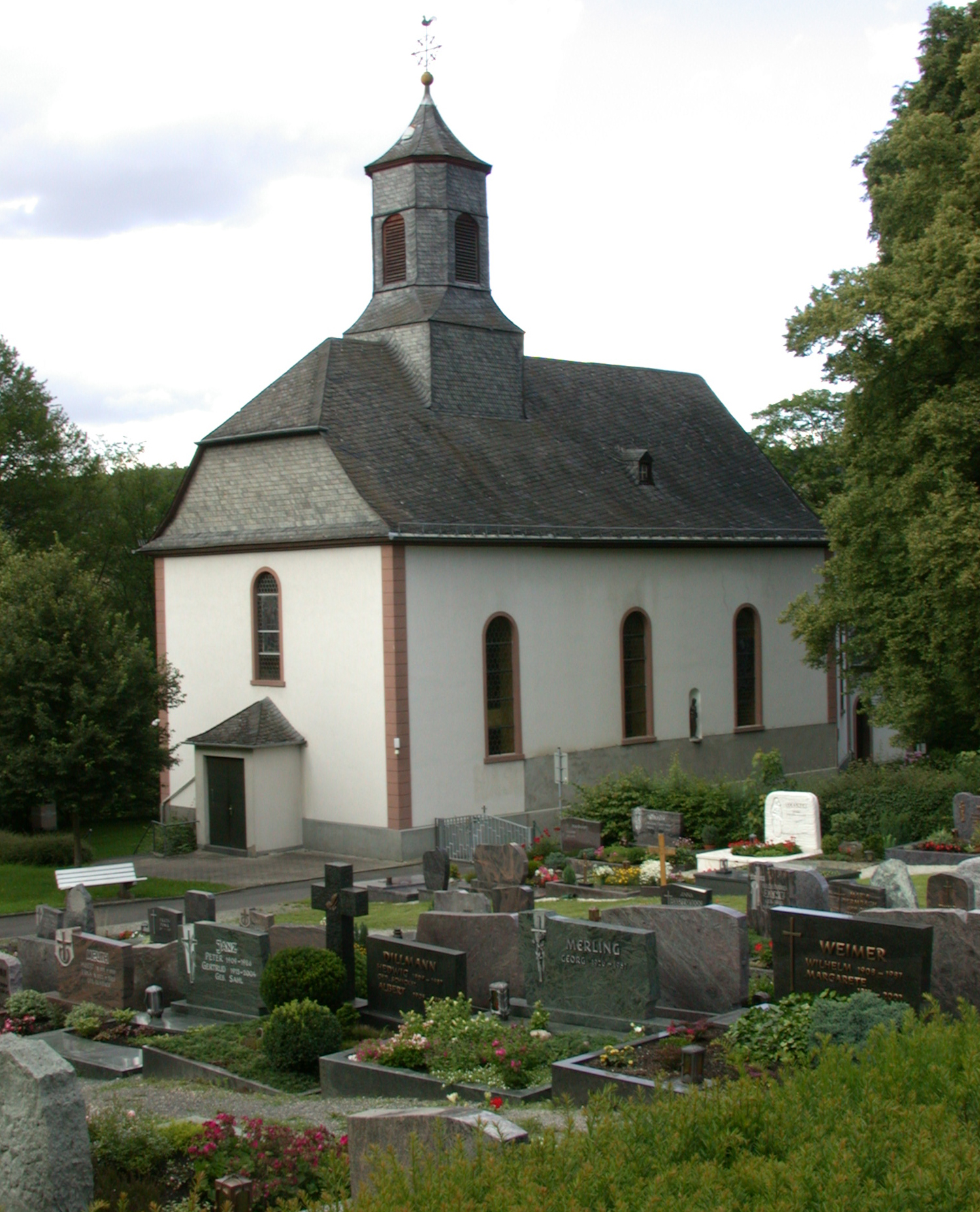 Kirche St. Georg Schwickershausen, Bad Camberg, Deutschland